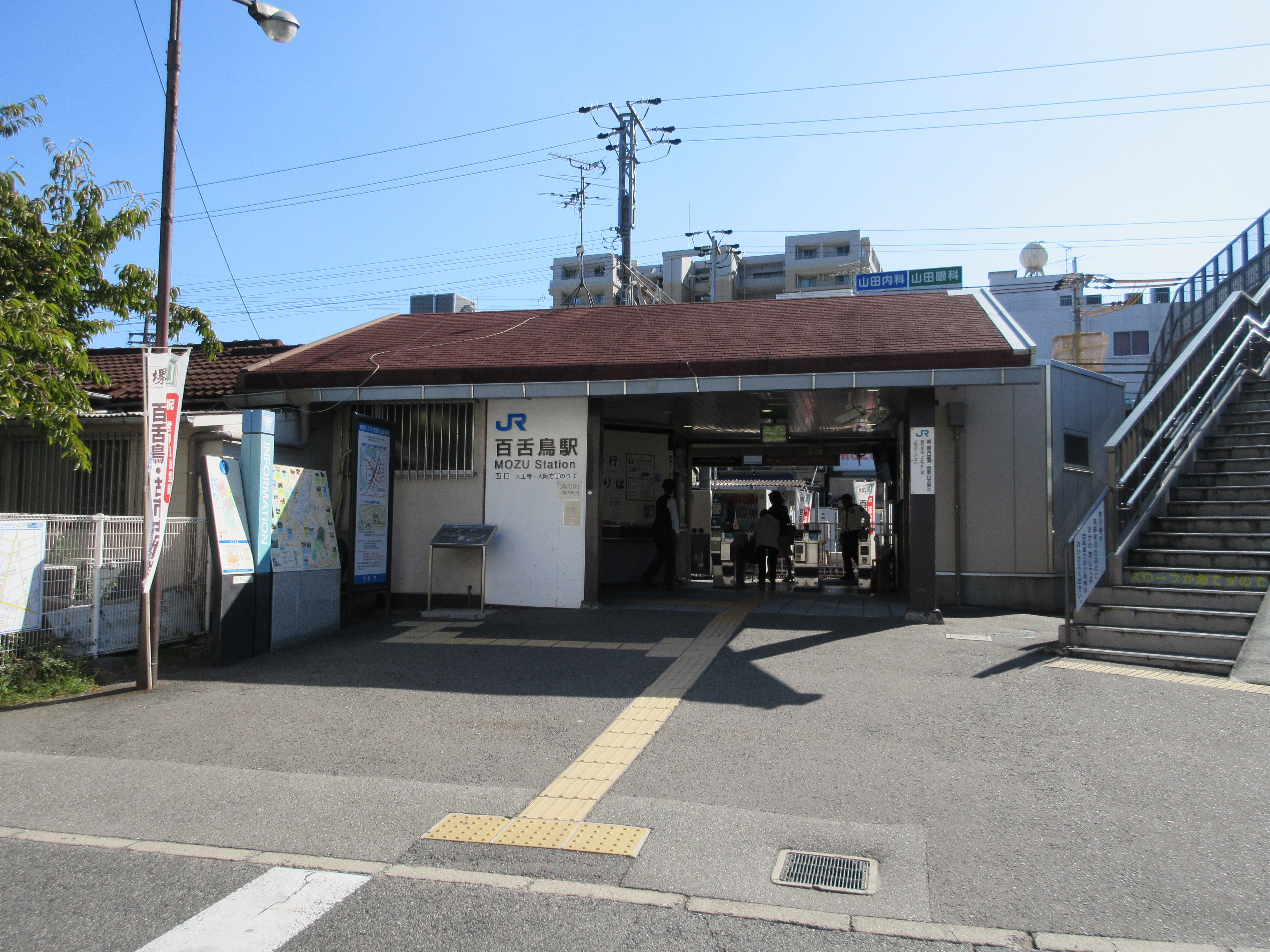 JR百舌鳥駅